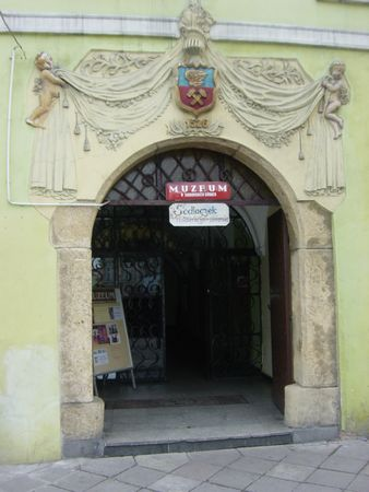 Winiarnia Sedlaczka w Tarnowskich Górach.